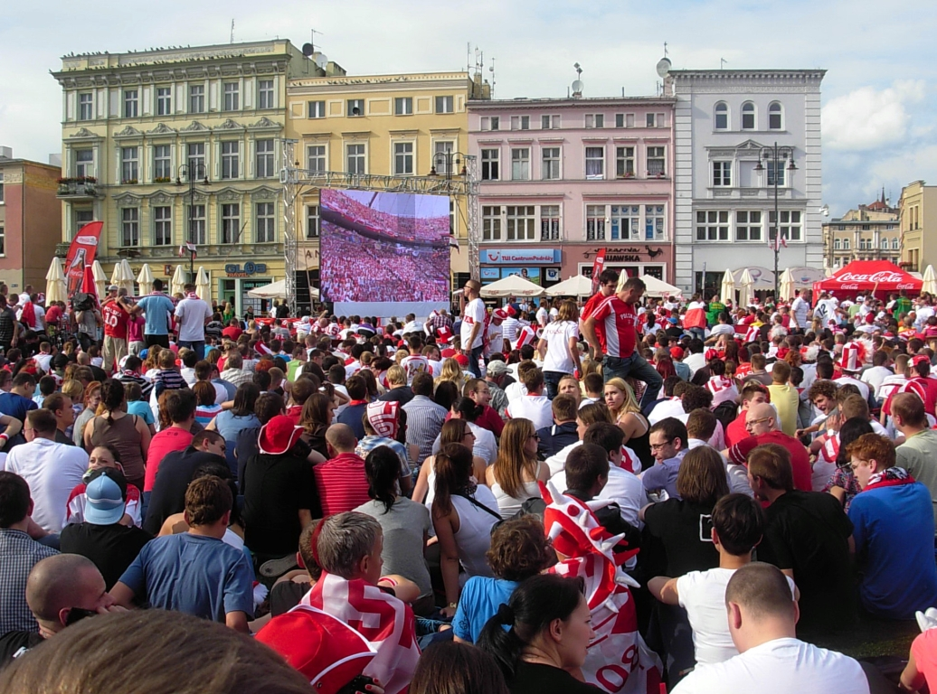 Polska-Grecja podczas MŚ w piłce nożnej Euro 2012 na Starym Rynku w Bydgoszczy